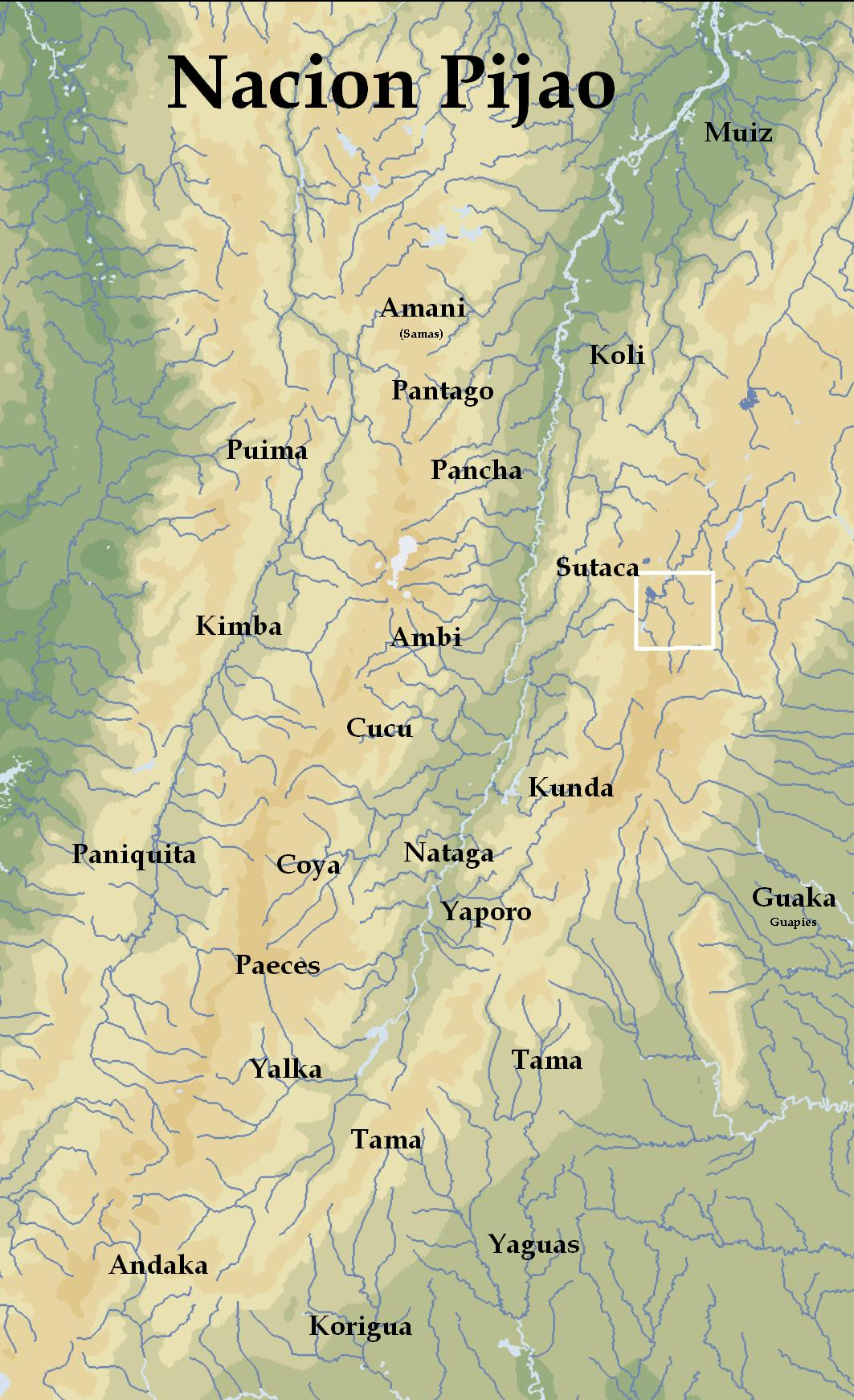 Mapa del Gran Tolima territorio Pijao (Etnologico prehispanico)